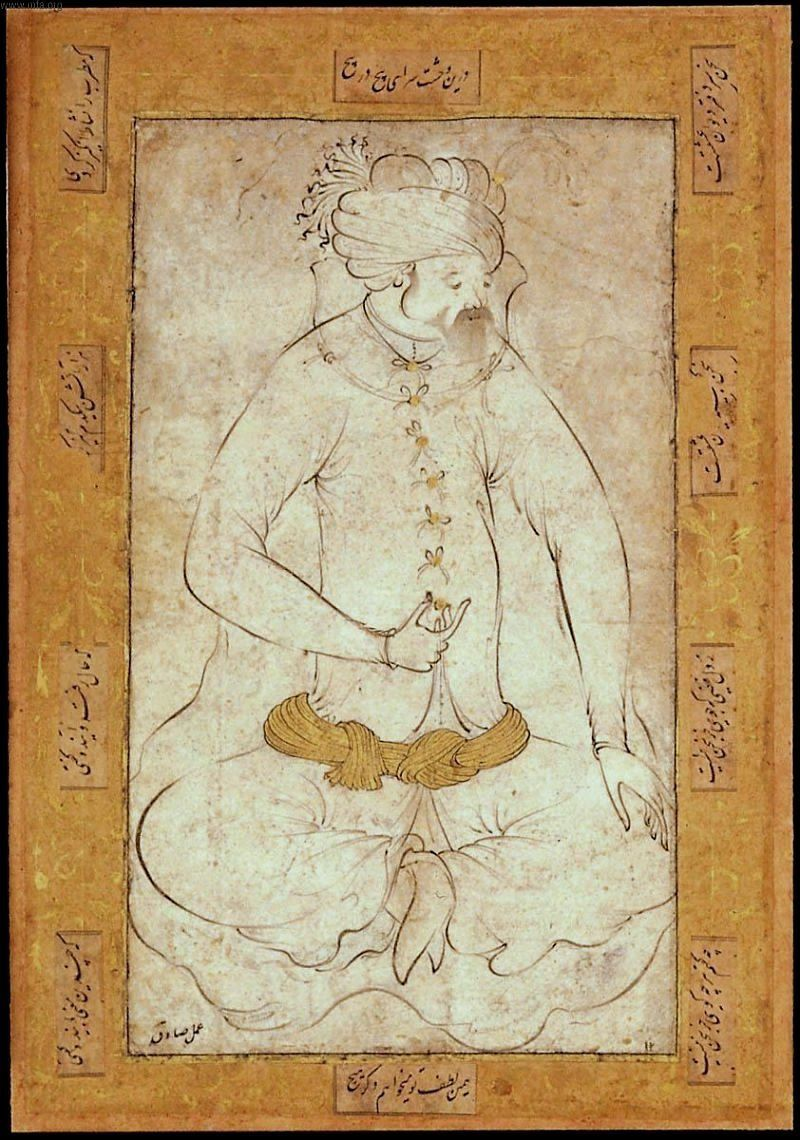 Садик.Сидящий мужчина.ок.1595гБостон МИИ